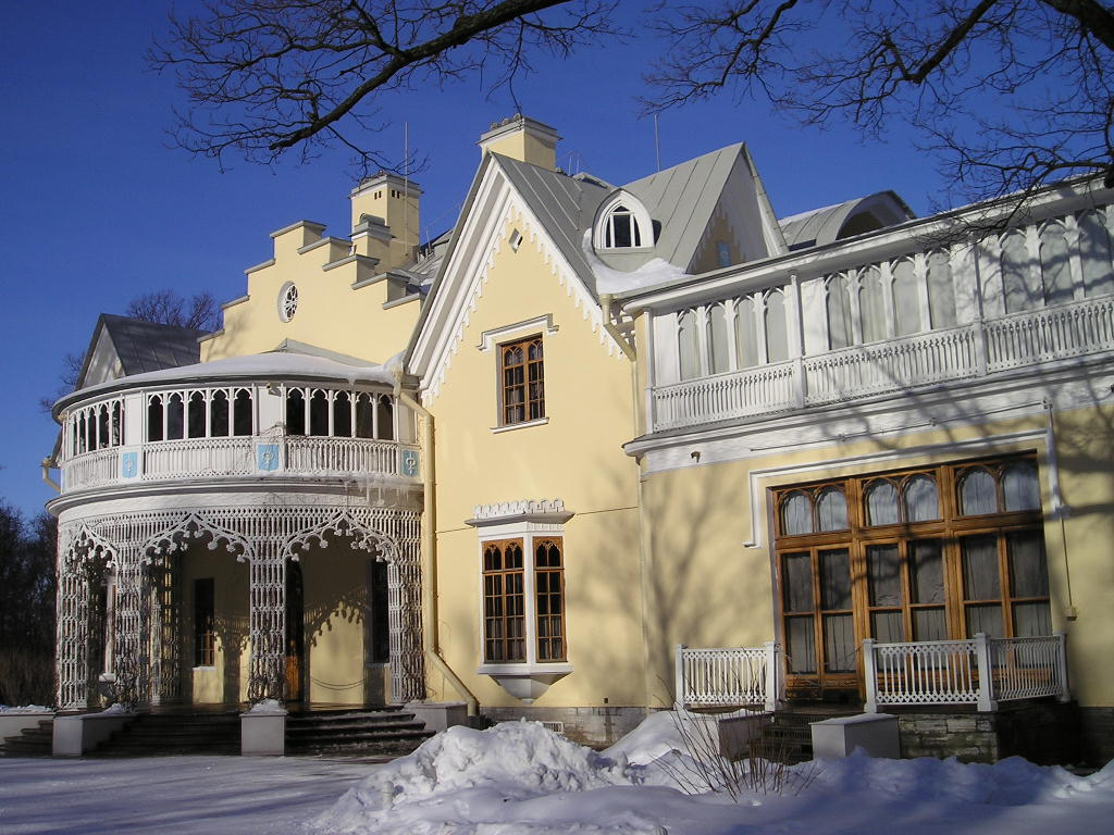 Alexandria park. Cottage.